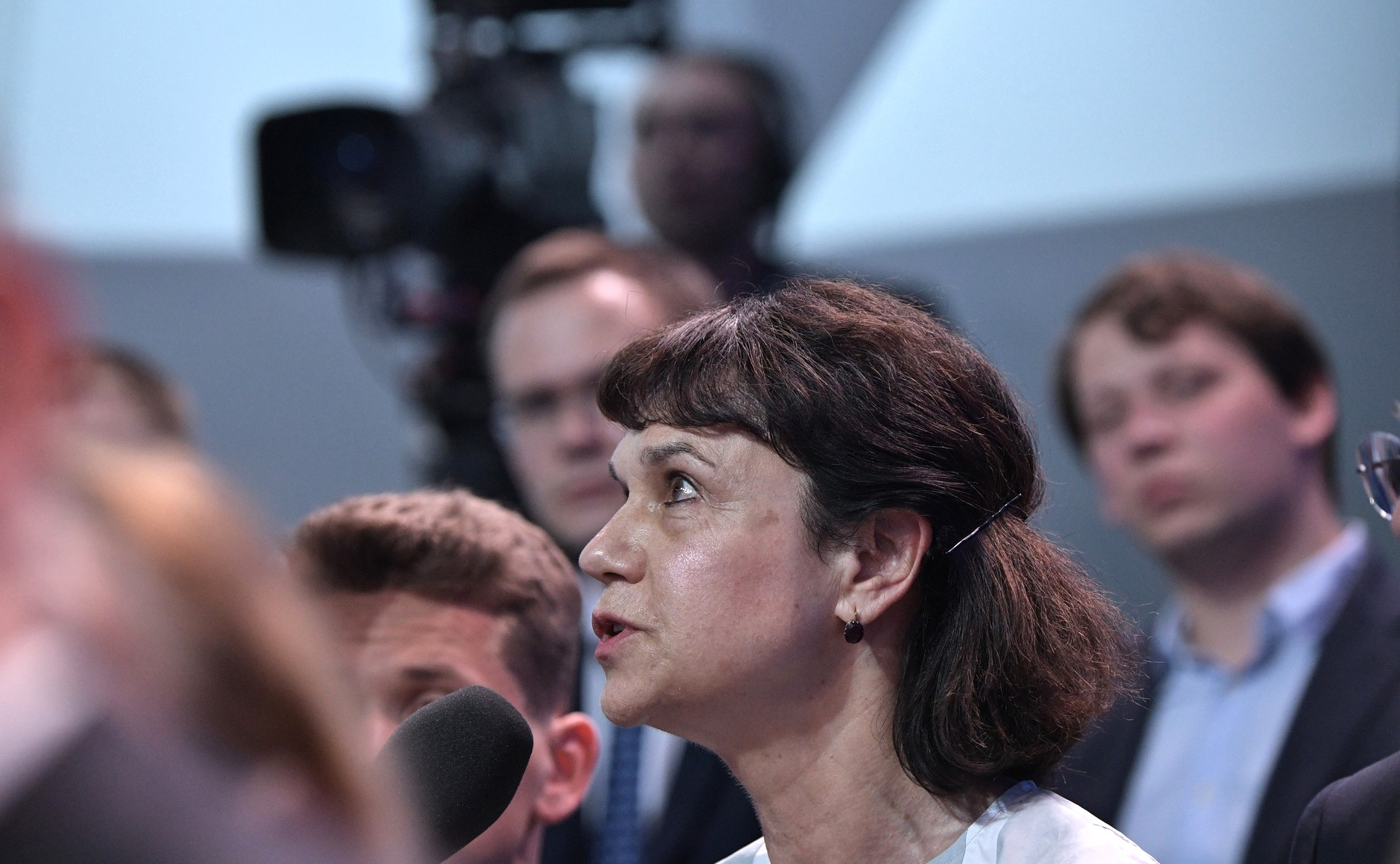 «Прямая линия с Владимиром Путиным»